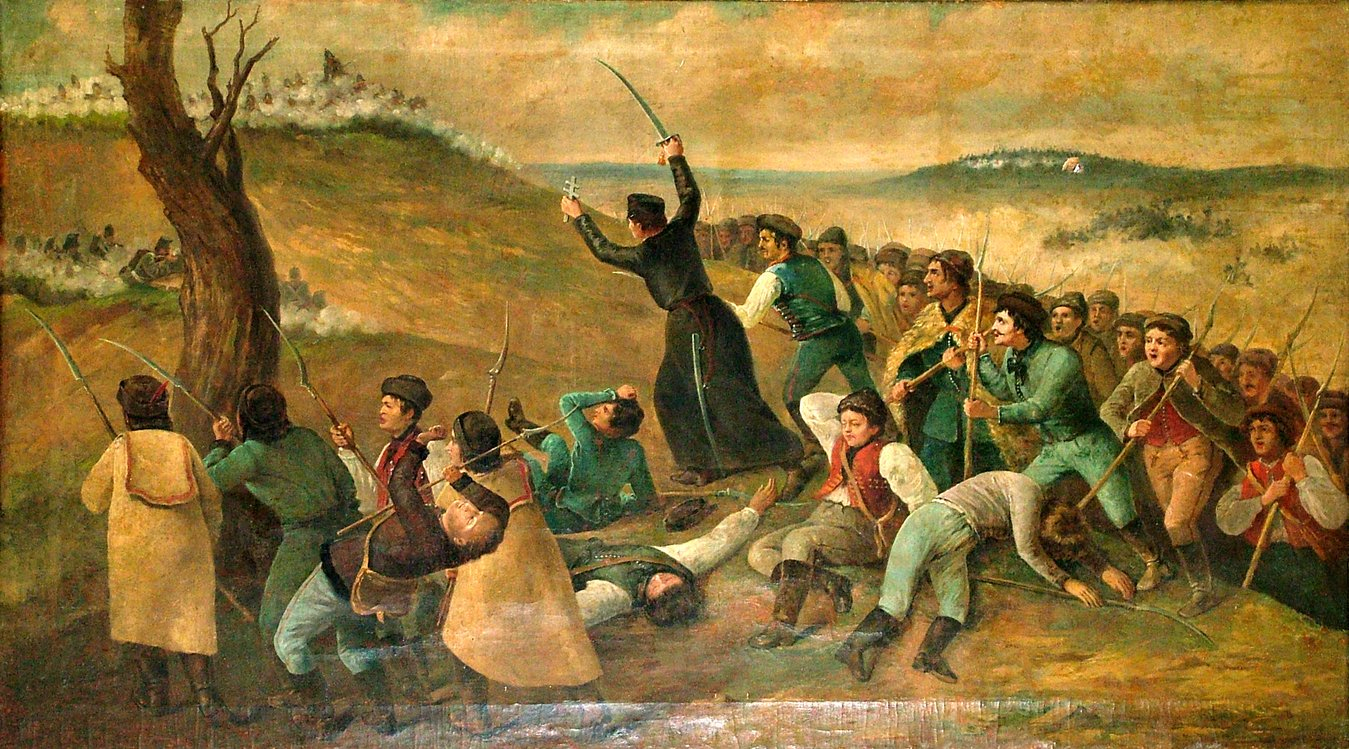 Erdősi Imre piarista a branyiszkói csatában (1849. február 5). Kecskemét, piarista rendház. Stech Alajos festménye.